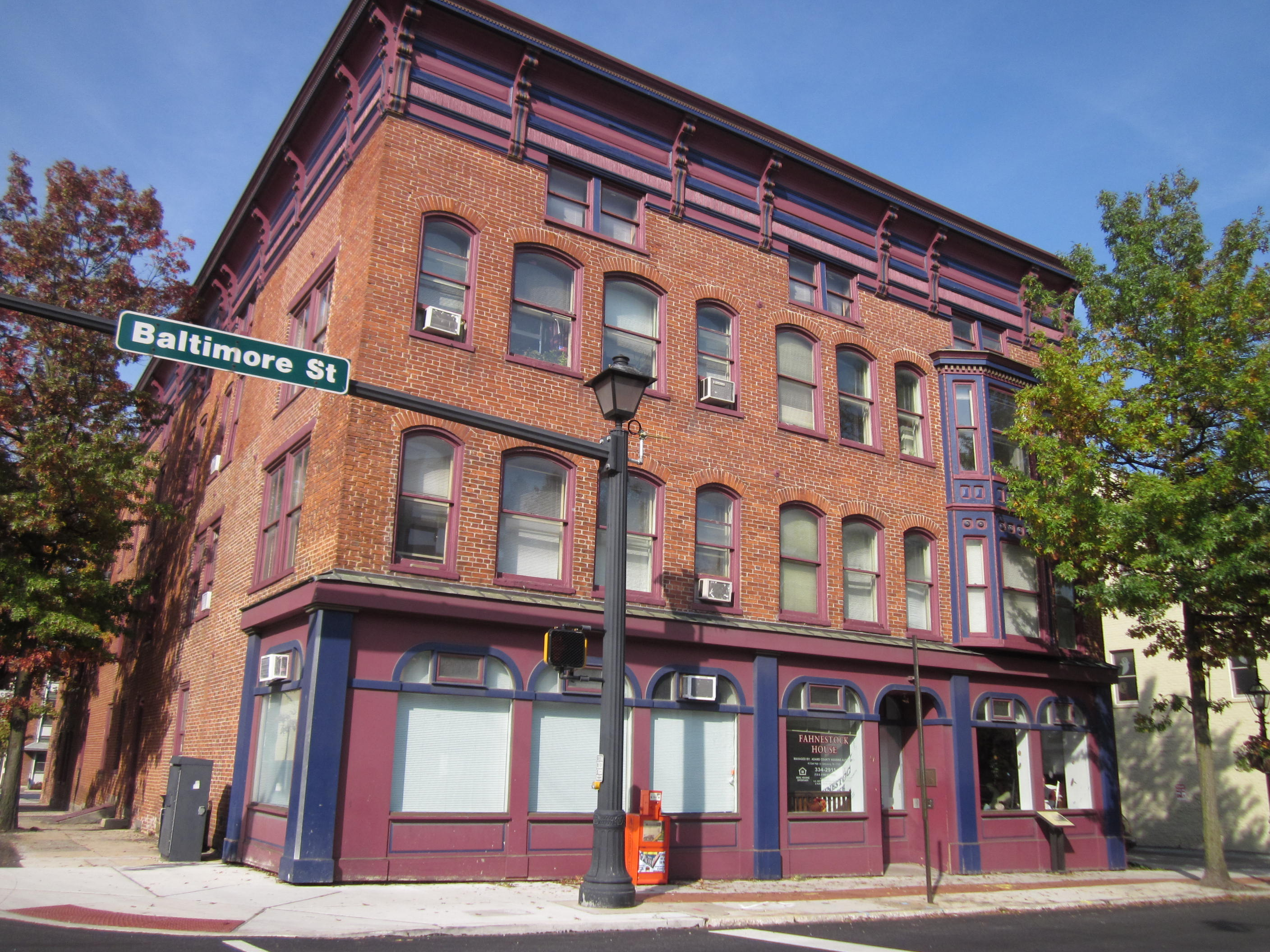 Gettysburg, Pennsylvania, fahnestock building